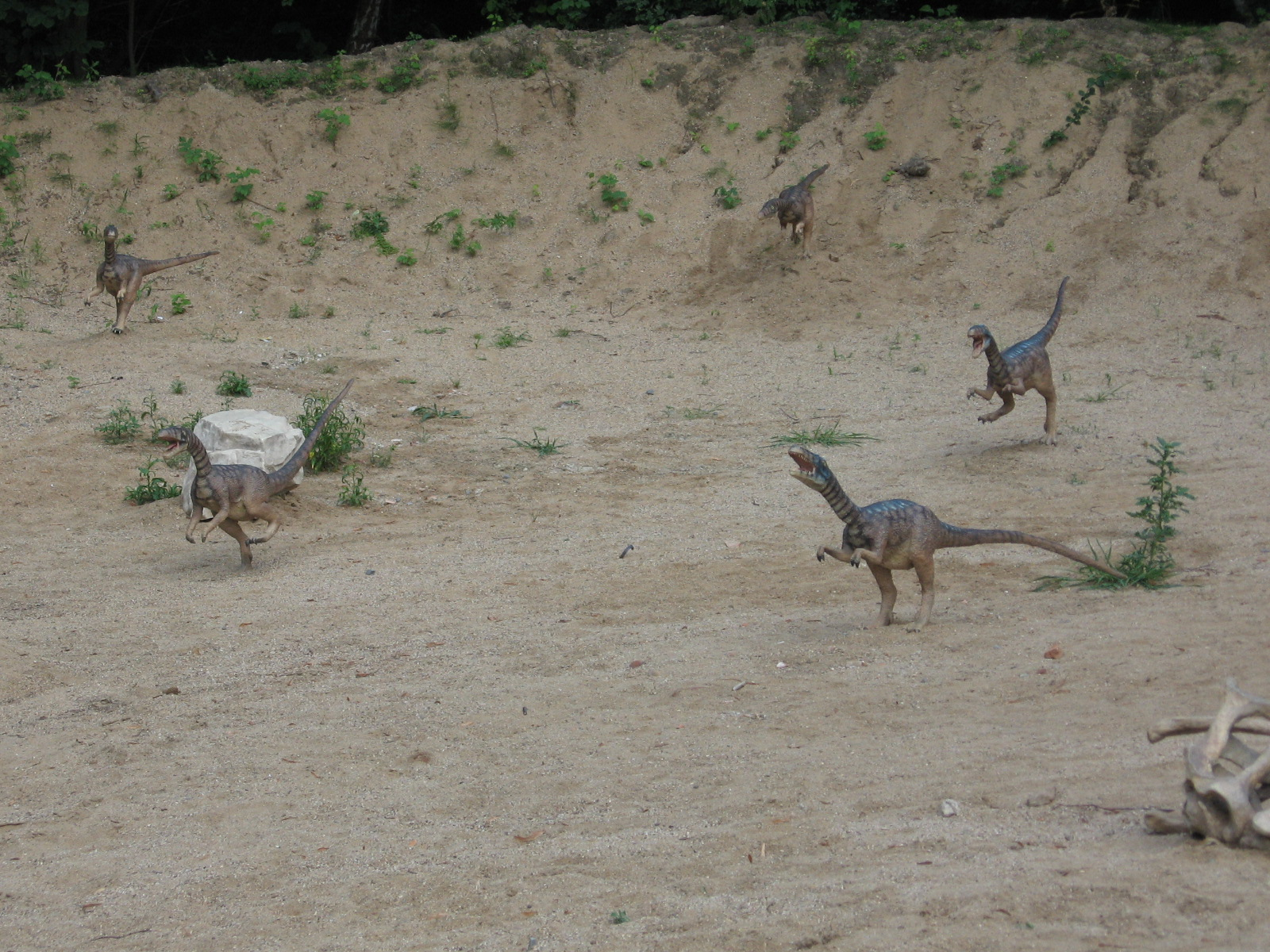 prehist. 010 (dinopark vyškov cz.)